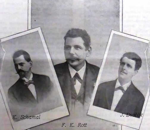 František Karel Rott (1850-1917), výrobce žesťových hudebních nástrojů